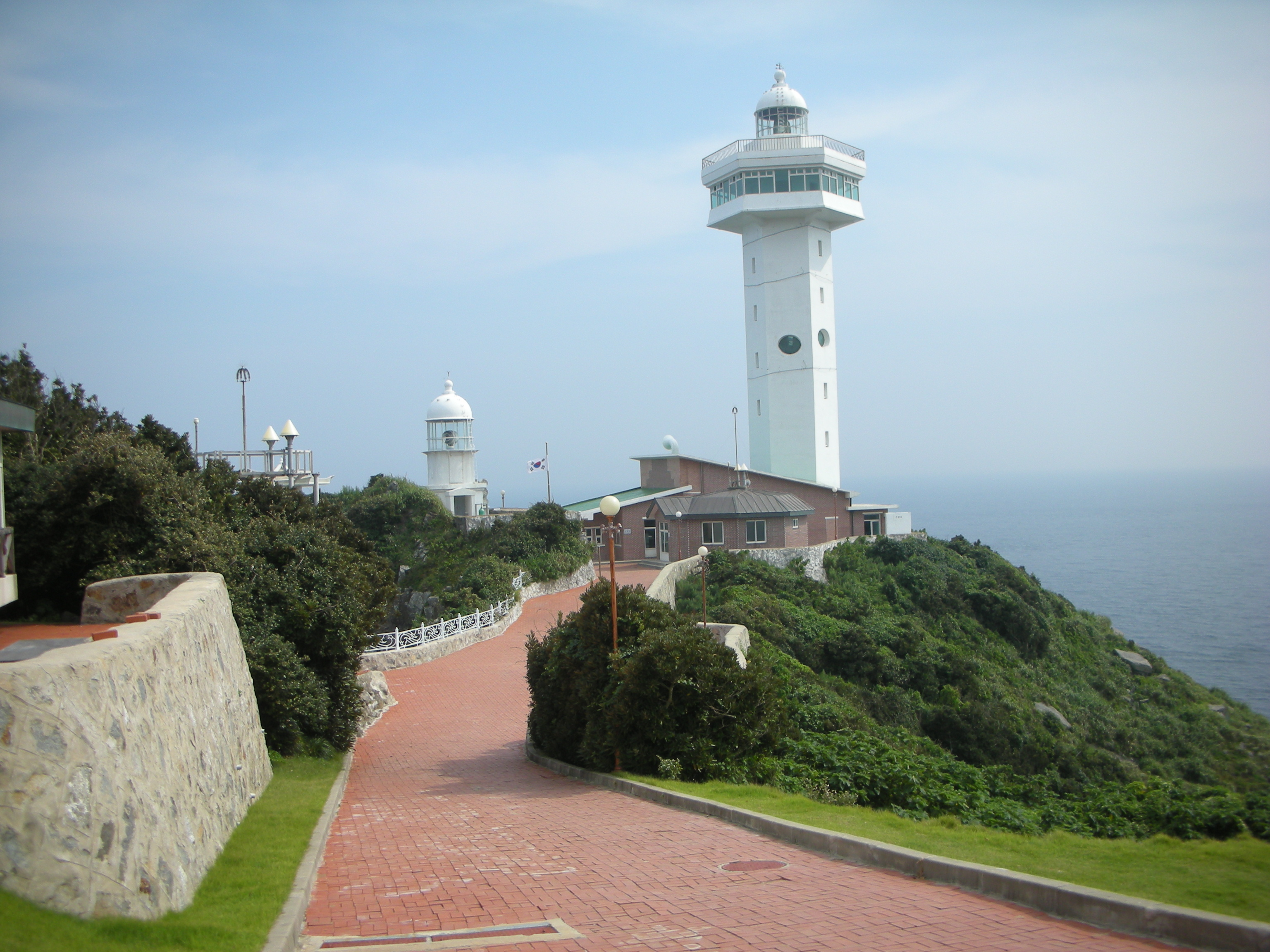 Geomundo 4